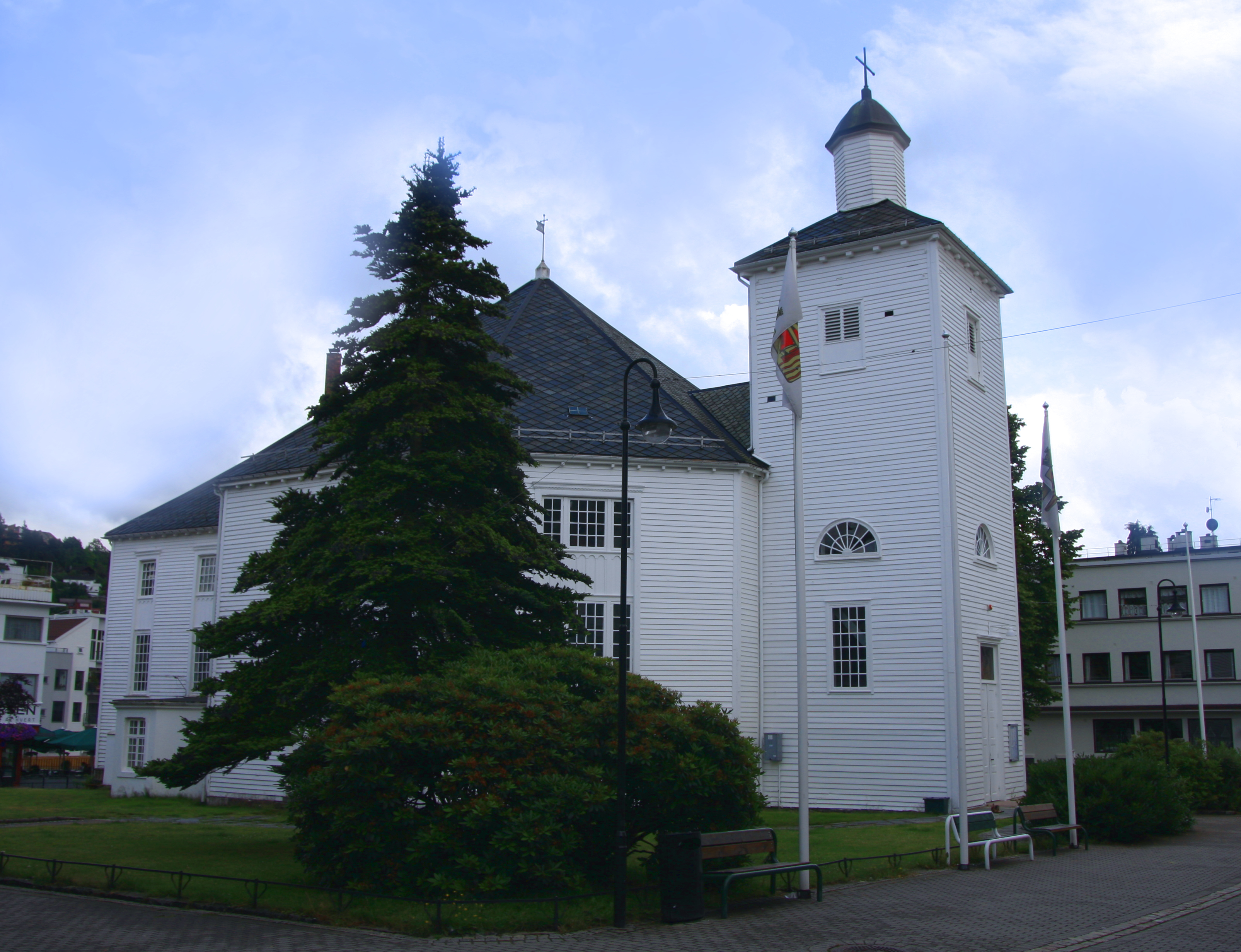 Flekkefjord kirke